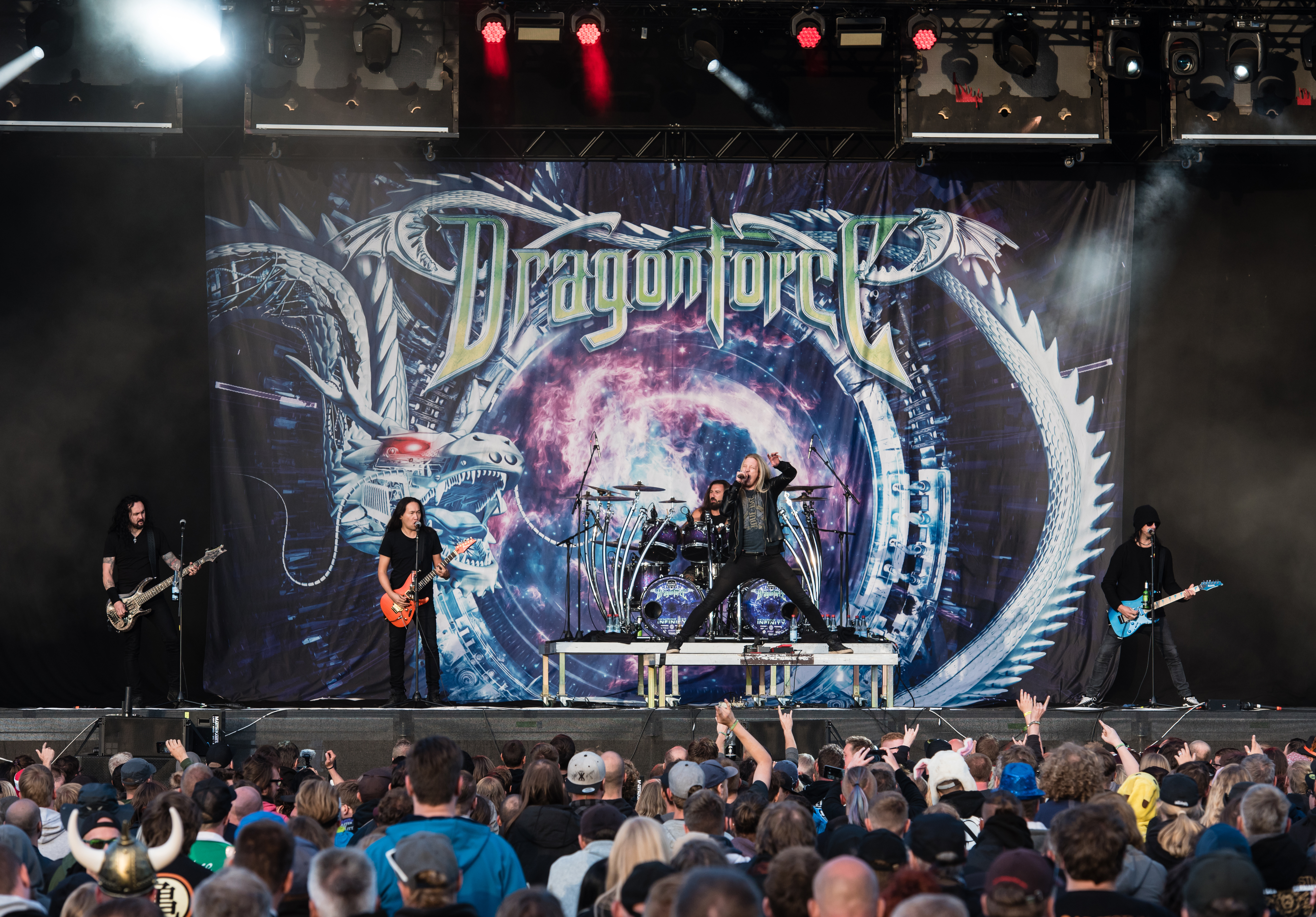 DragonForce auf dem Reload Festival 2018